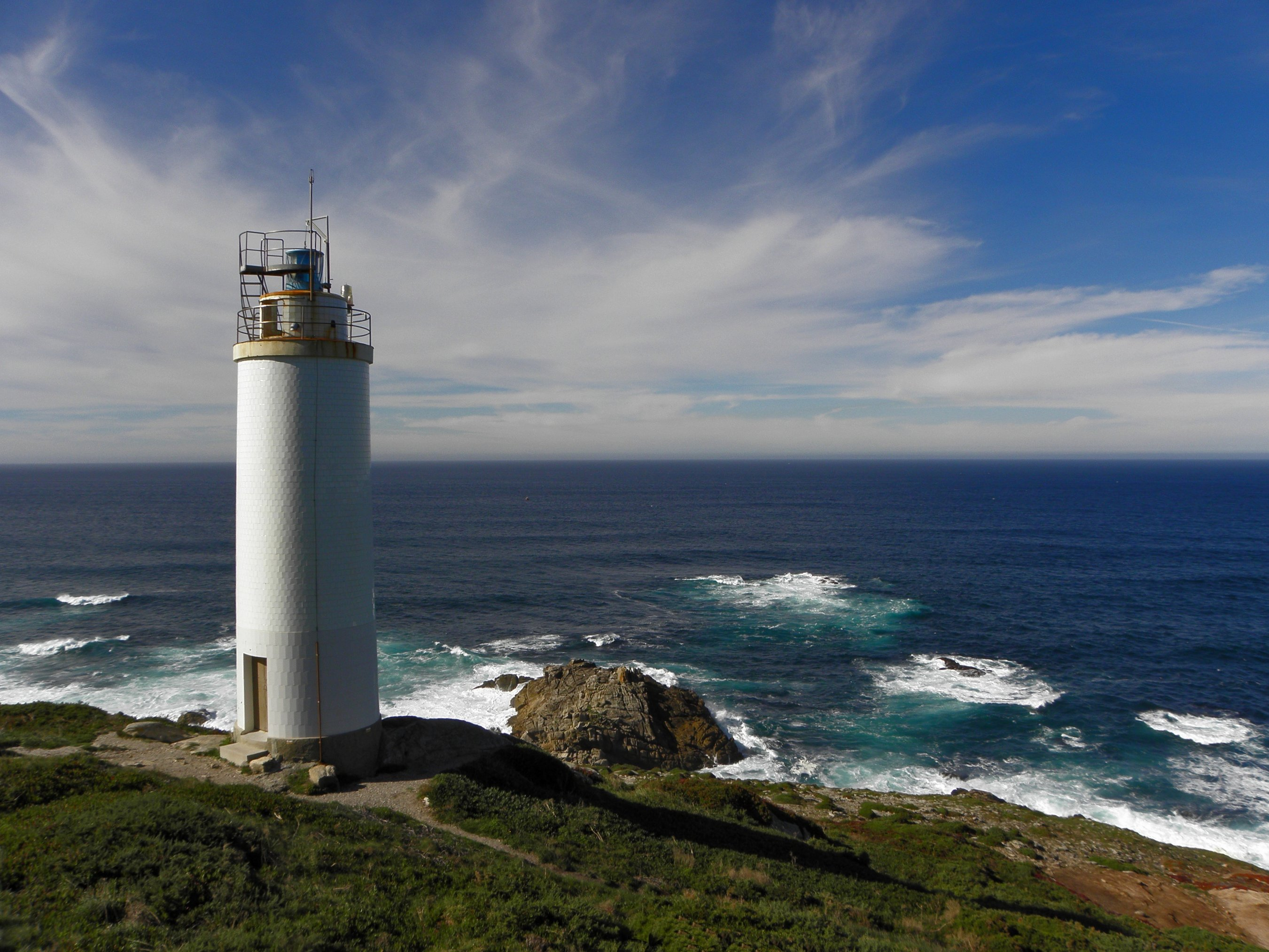 Faro de Laxe